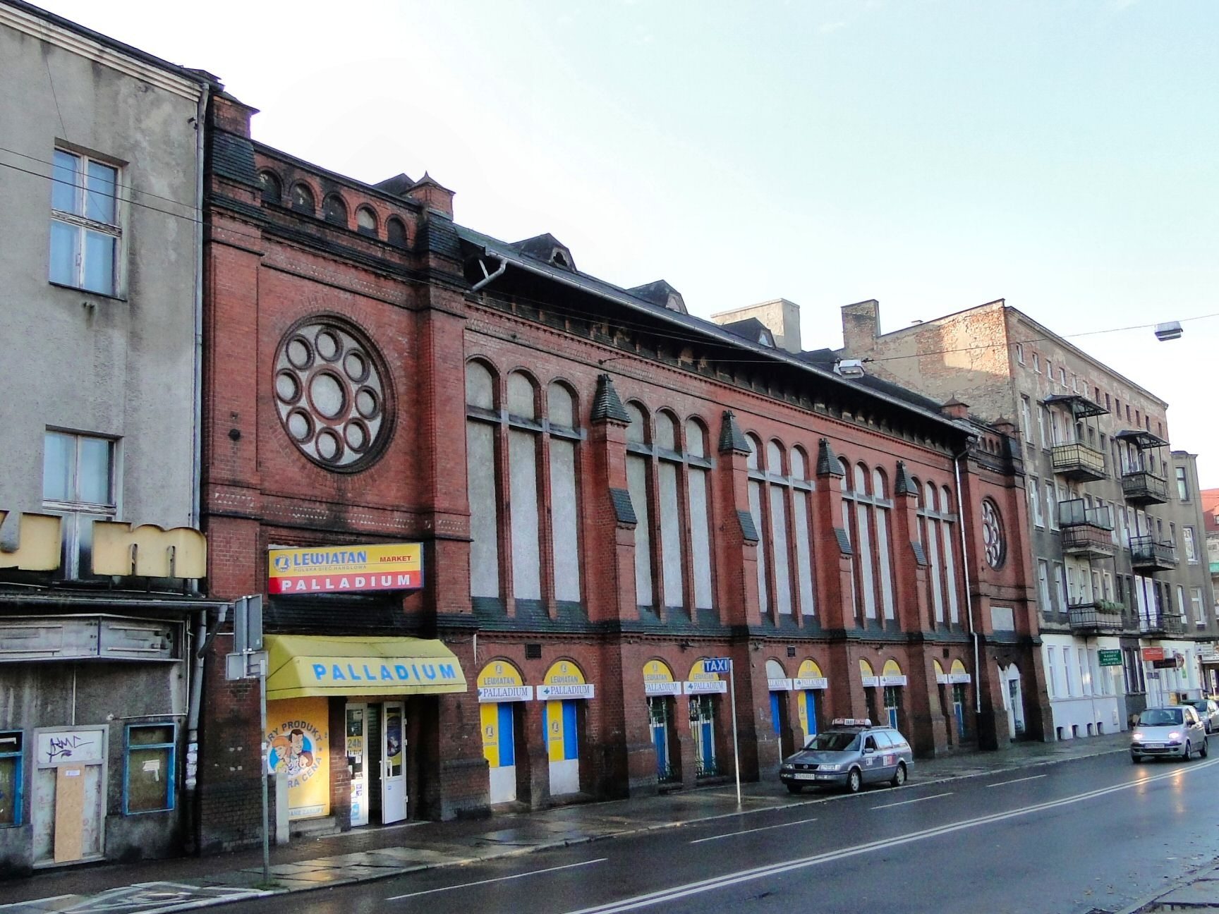 Dawne kino Colosseum w Szczecinie